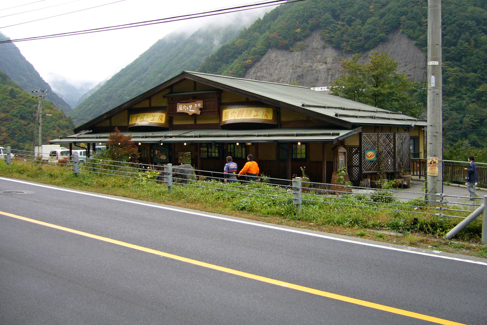 Fuketsu-no-sato in Matsumoto, Nagano prefecture